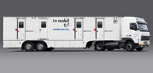 Ü - Wagen